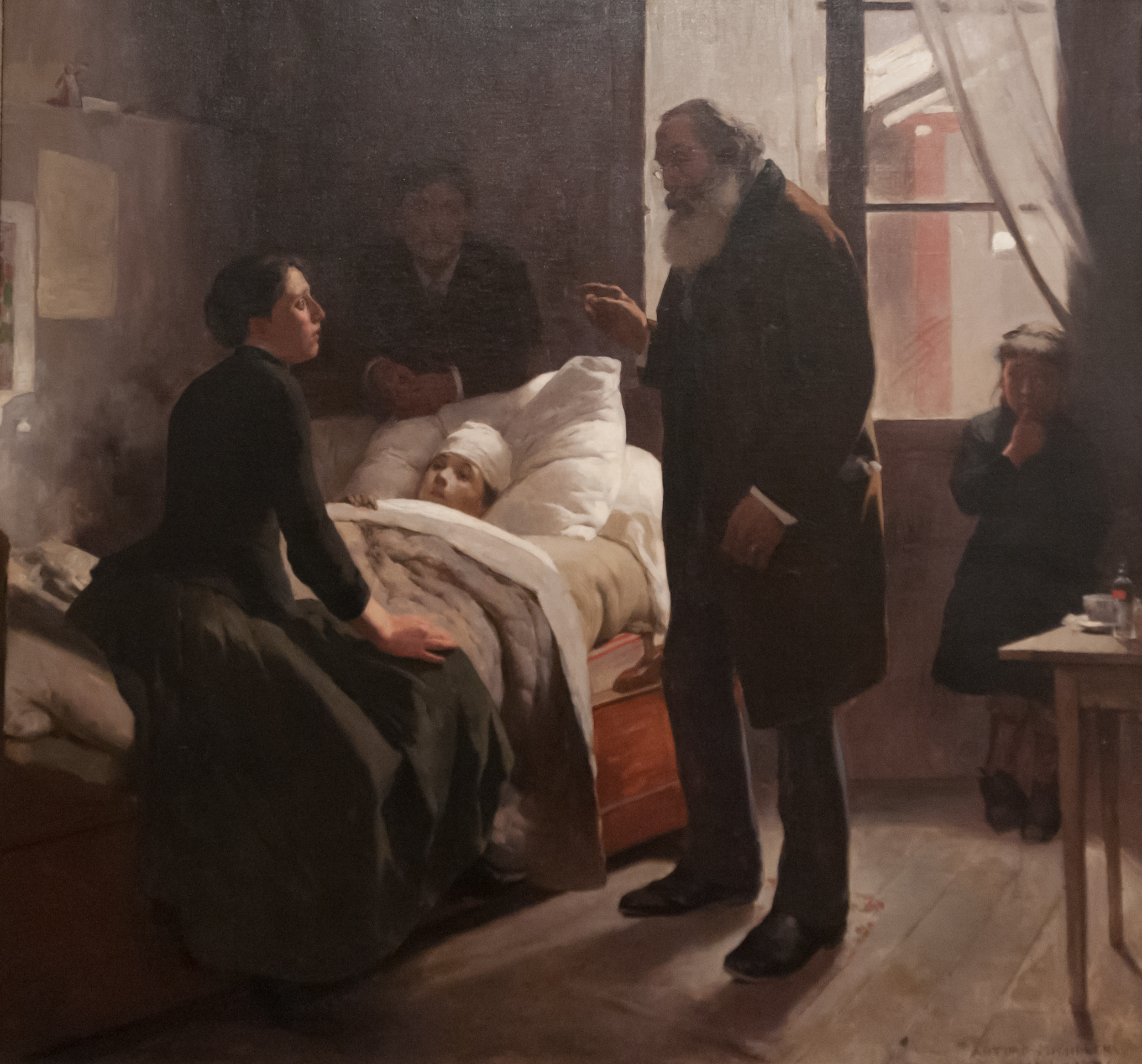 El niño enfermo. Paris 1886. Oleo sobre tela, Arturo Michelena. Colección de la Galería de Arte Nacional, Caracas – Venezuela